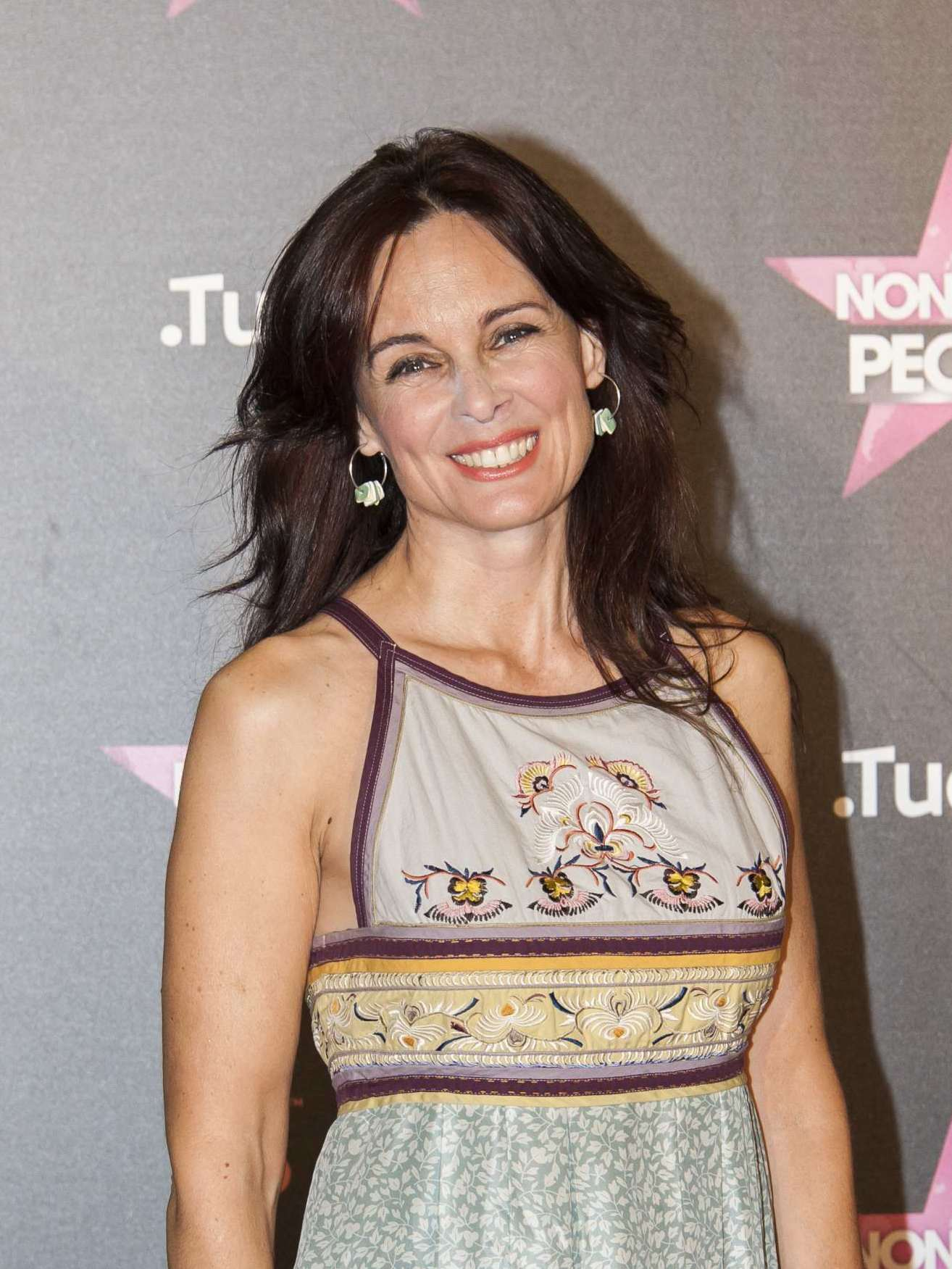 Fotos del photocall y fiesta de lanzamiento de un nuevo canal de televisión en España.